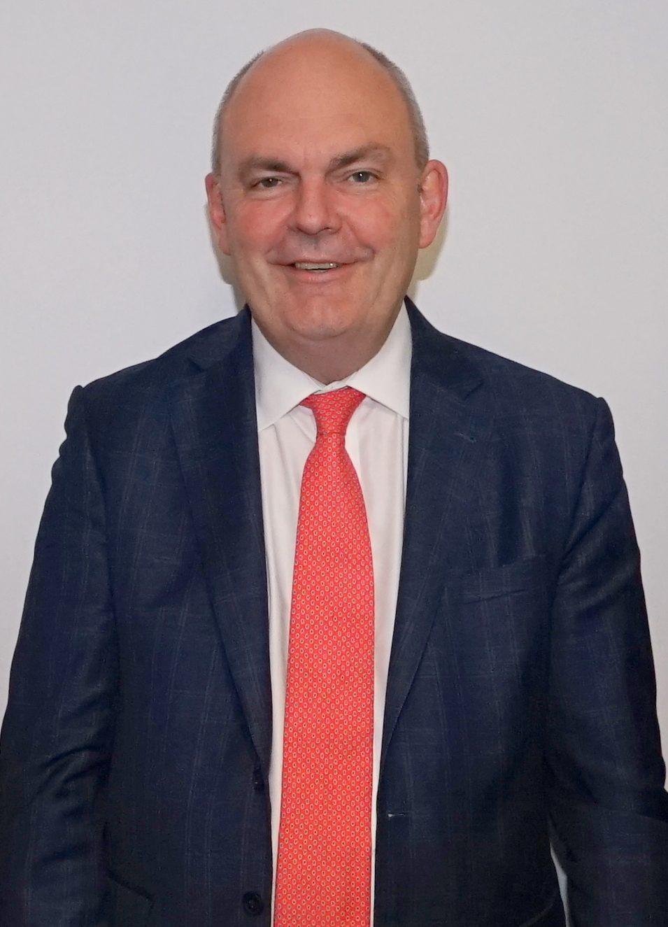 Välisminister Marina Kaljurand, Soome välisminister Timo Soini ja Uus-Meremaa IT minister Steven Joyce avasid täna Eesti, Soome ja Uus-Meremaa innovatsioonifoorumi.